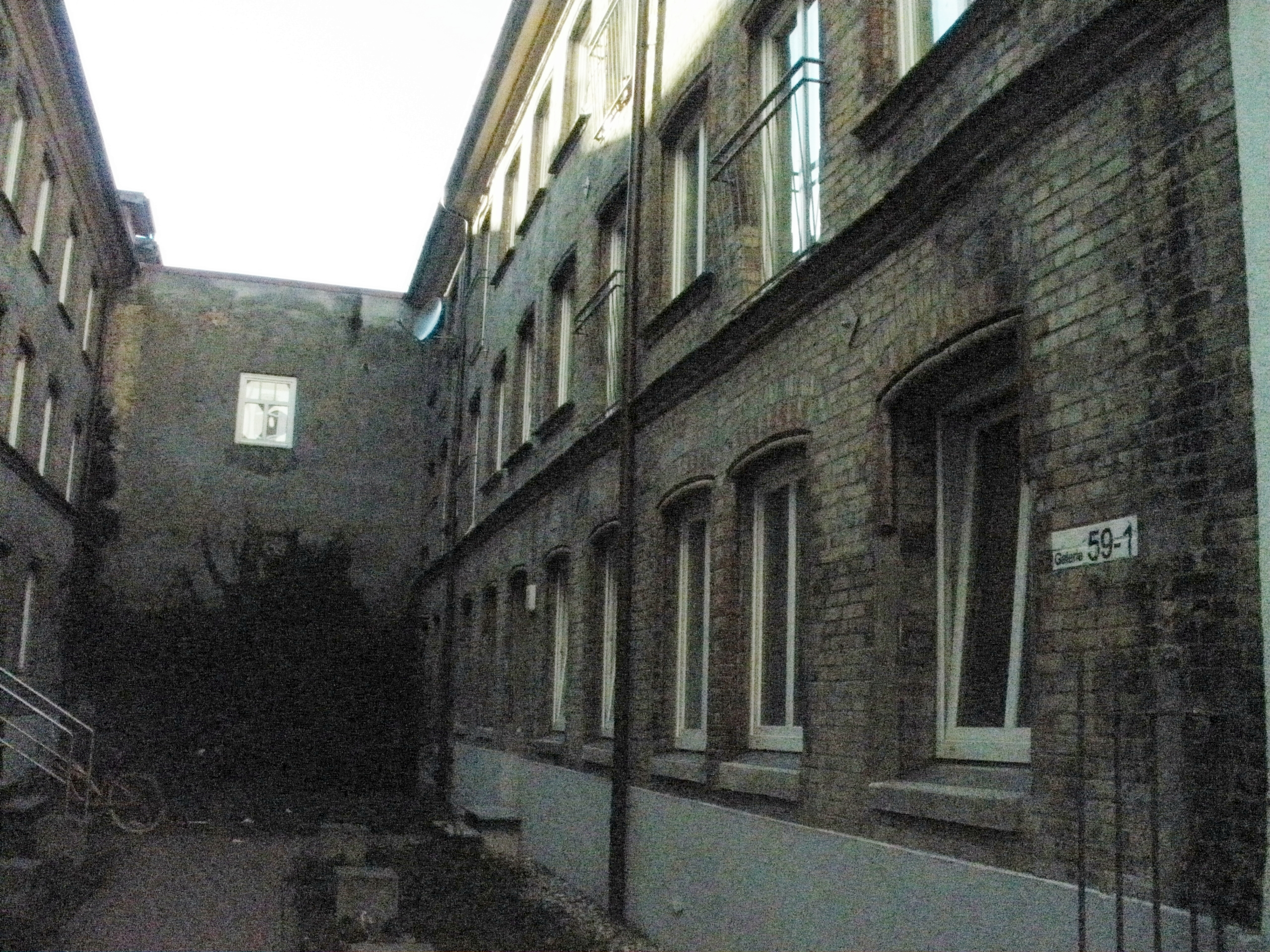 braunschweiger hof im schulterblatt, hamburg sternschanze schanzenviertel